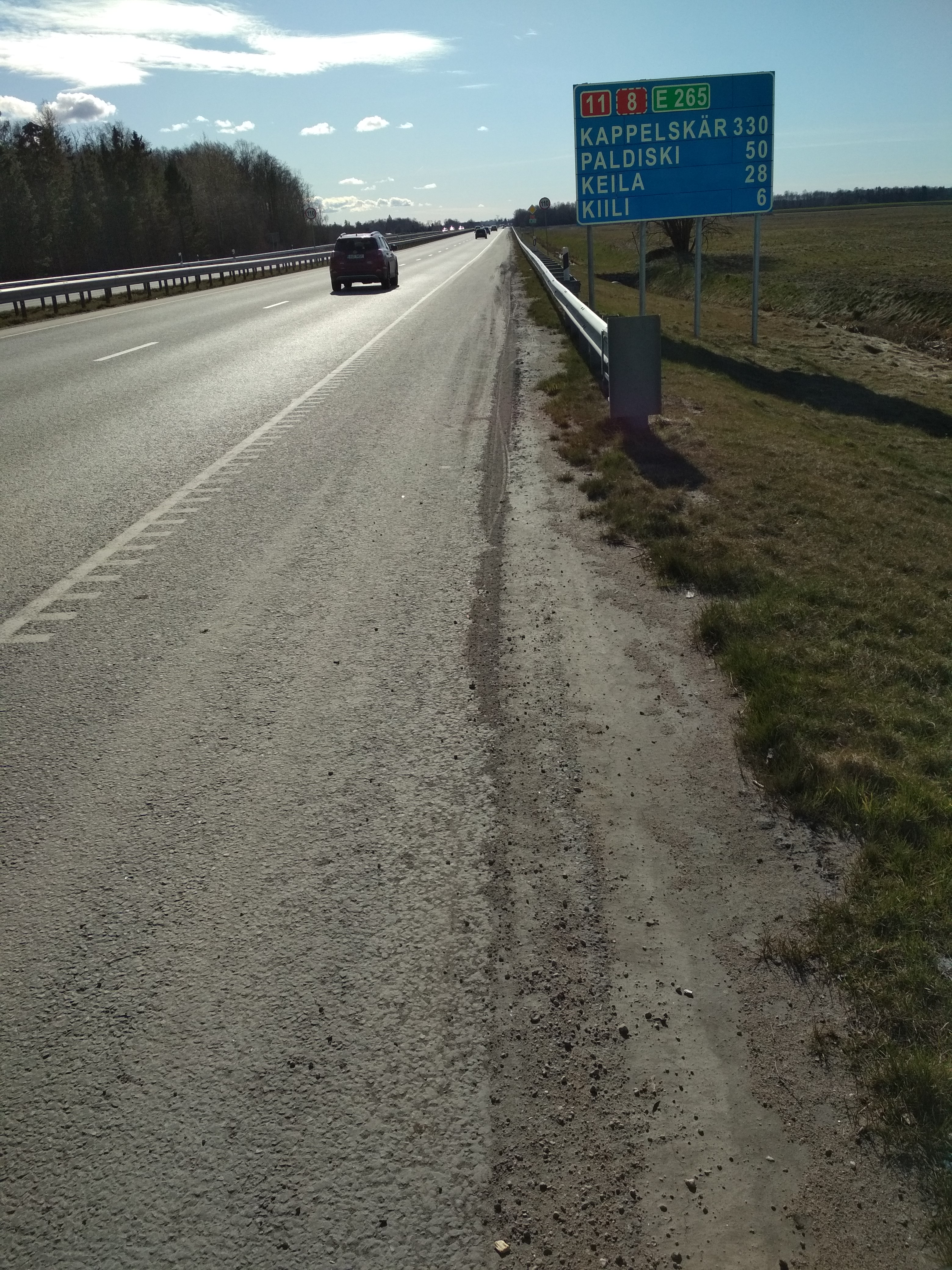 Tallinna ringtee Jüri juures